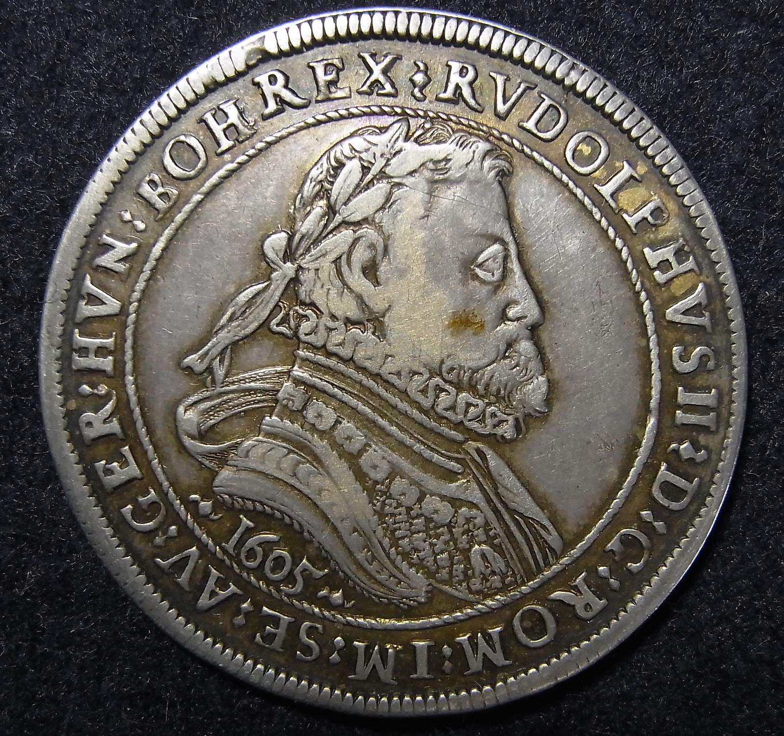 オーストリア（神聖ローマ帝国） ルドルフ二世のターラー銀貨 1605年 ハル・ミント